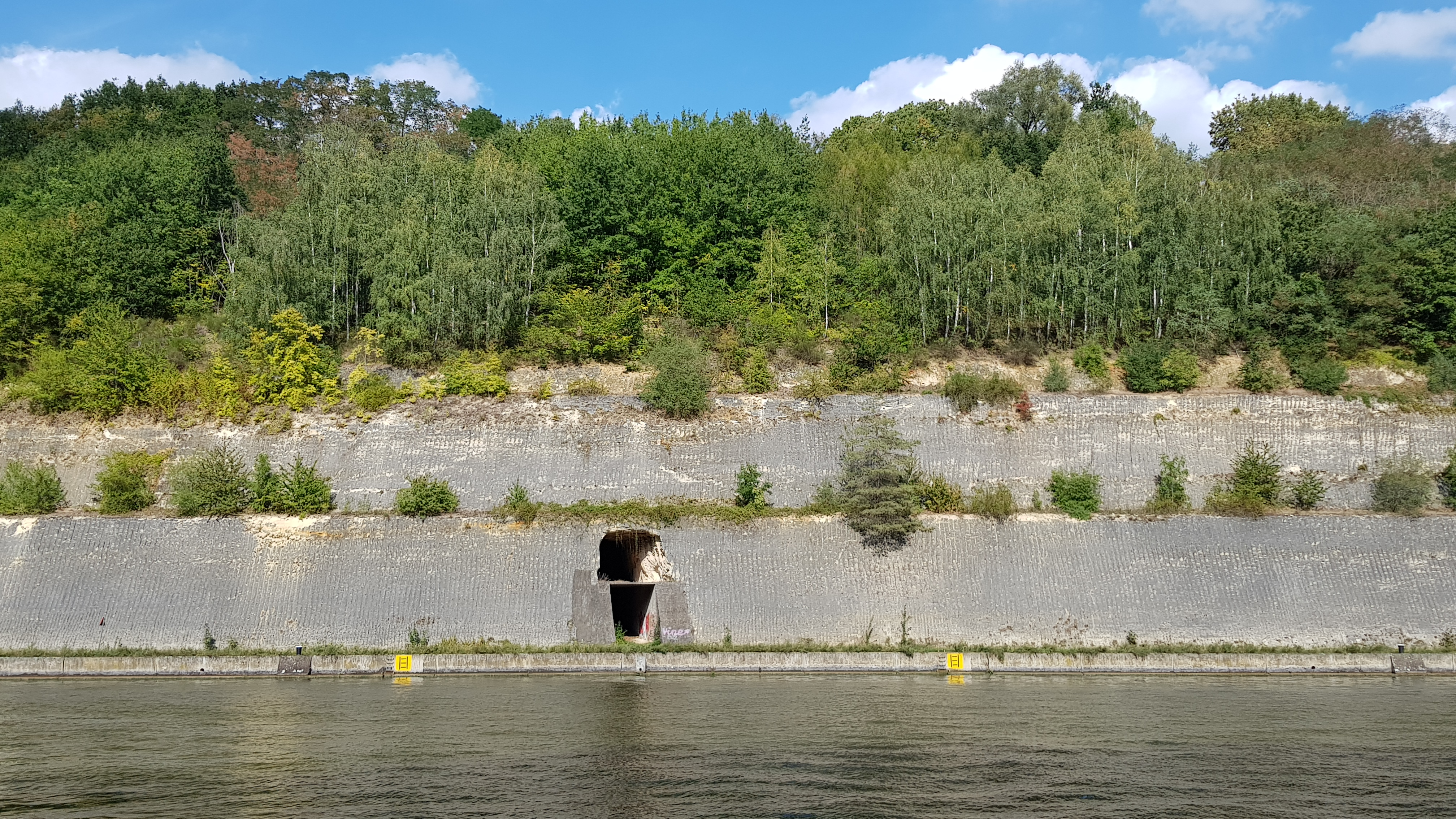 Groeve De Nieuwe Keel, Kanne, België